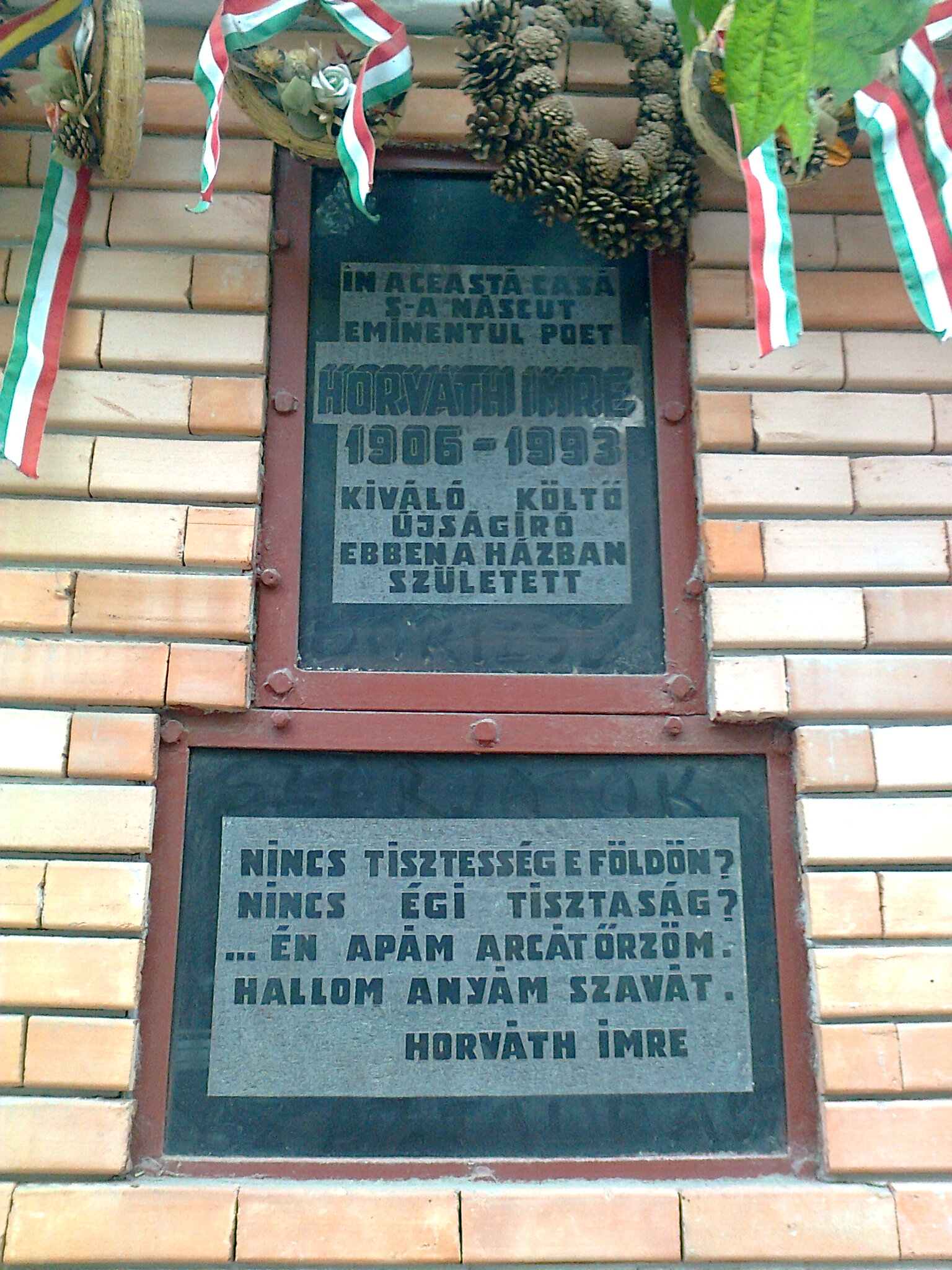 Emléktábla Horváth Imre margittai szülőházán, Bihar megye, Románia